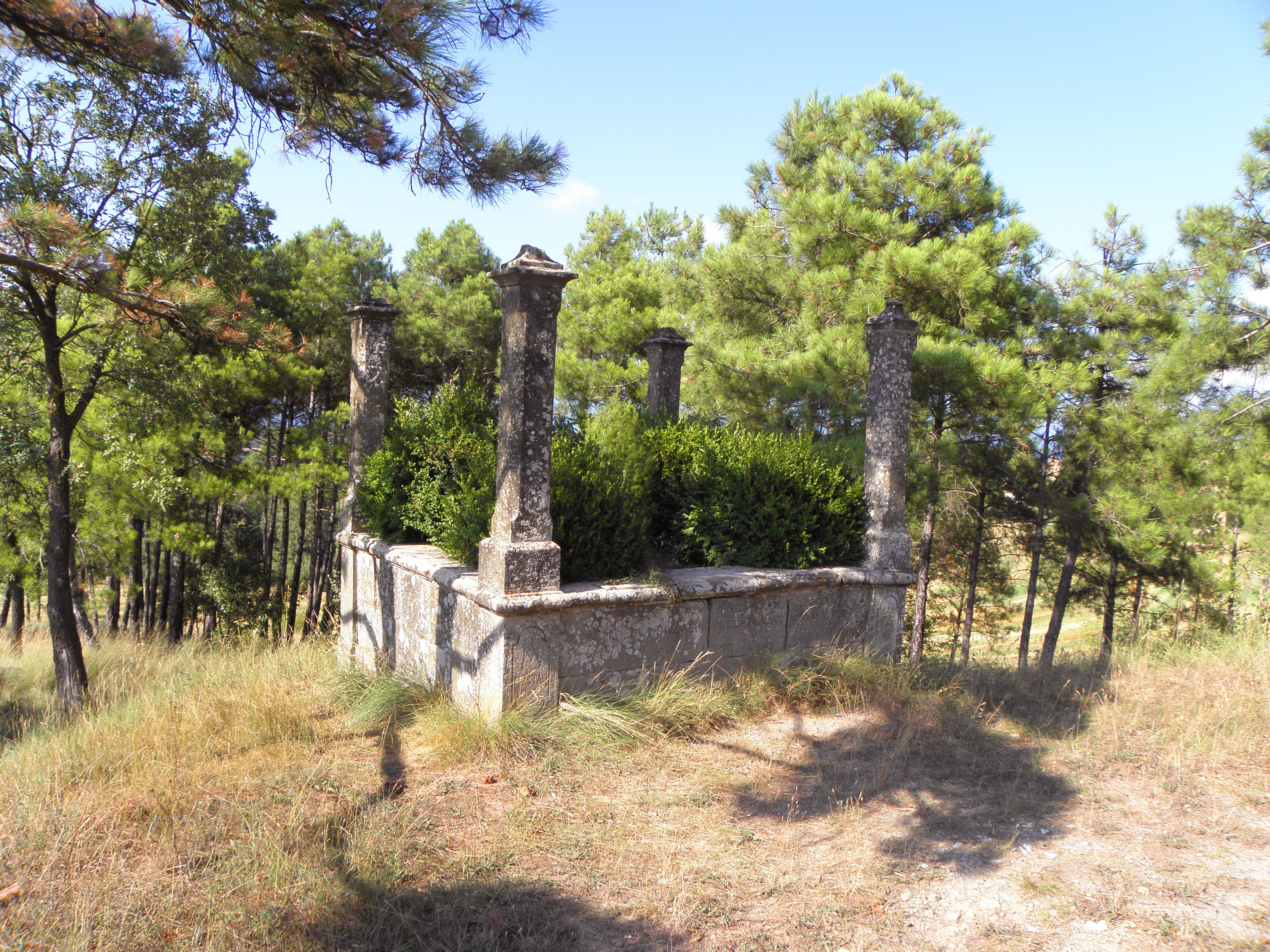 El clos de davant la Capella de la Desaparició, al Santuari del Miracle (Riner, Solsonès)